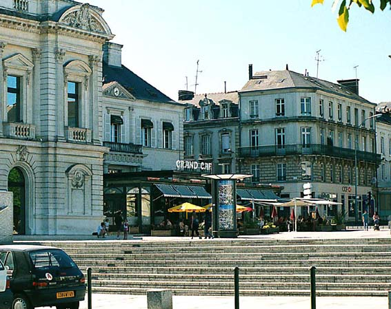 Place Travot - Cholet (France) Photo prise par moi même en juin 2001 avec mon appareil Minolta (argentique) puis mis sur CD par le service photos de Carrefour.Frombenny Discuter 9 août 2006 à 16:36 (CEST)